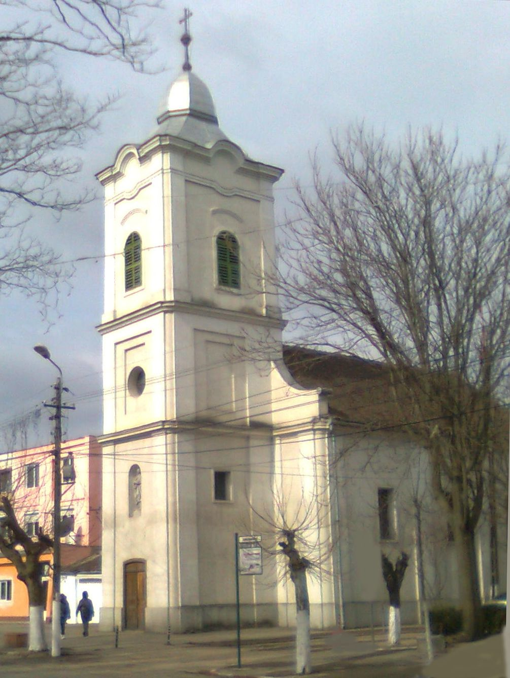 Katolikus templom, Margitta.